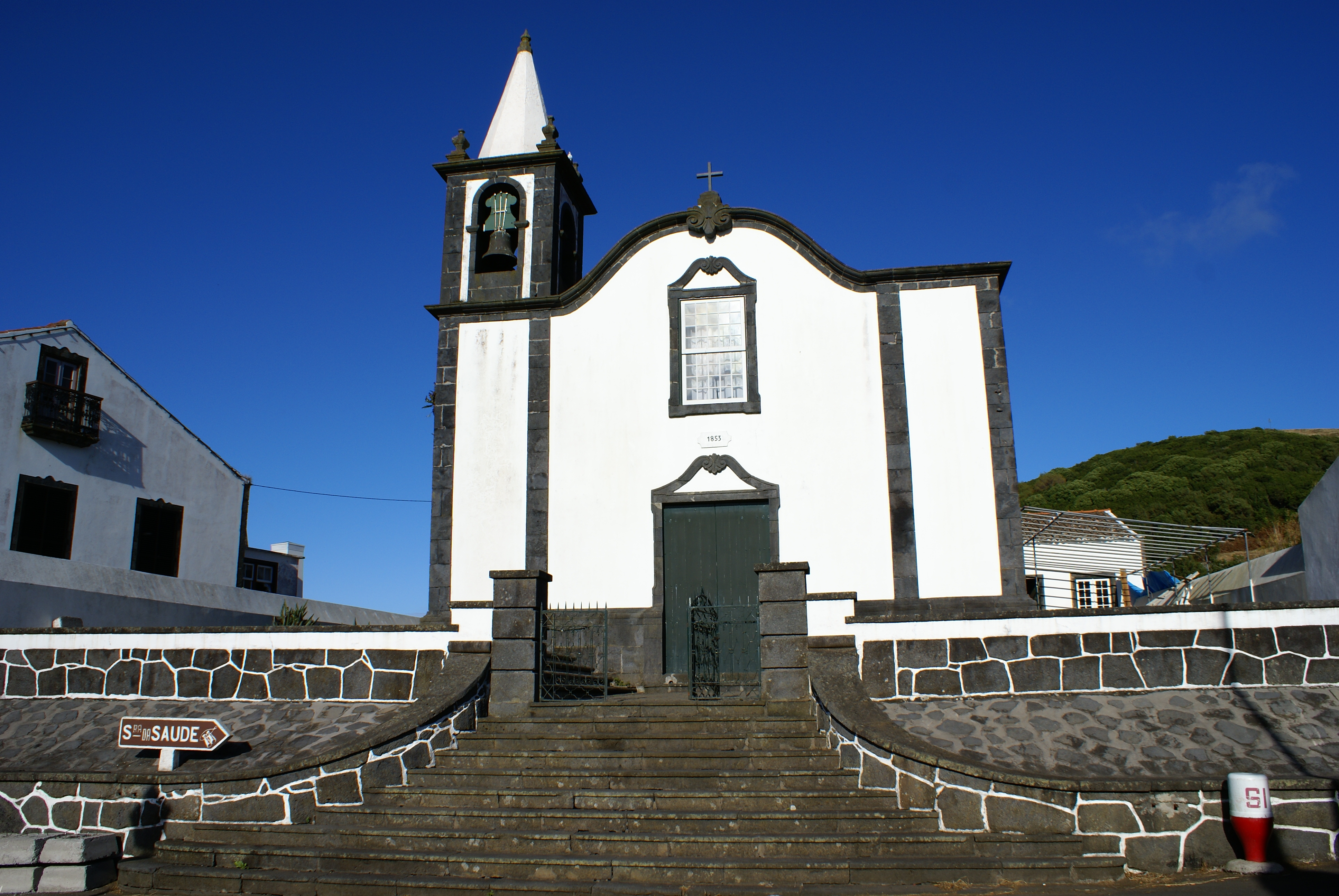 Ermida de Santa Quitéria, Fonte do Mato, ilha Graciosa, Açores, Portugal